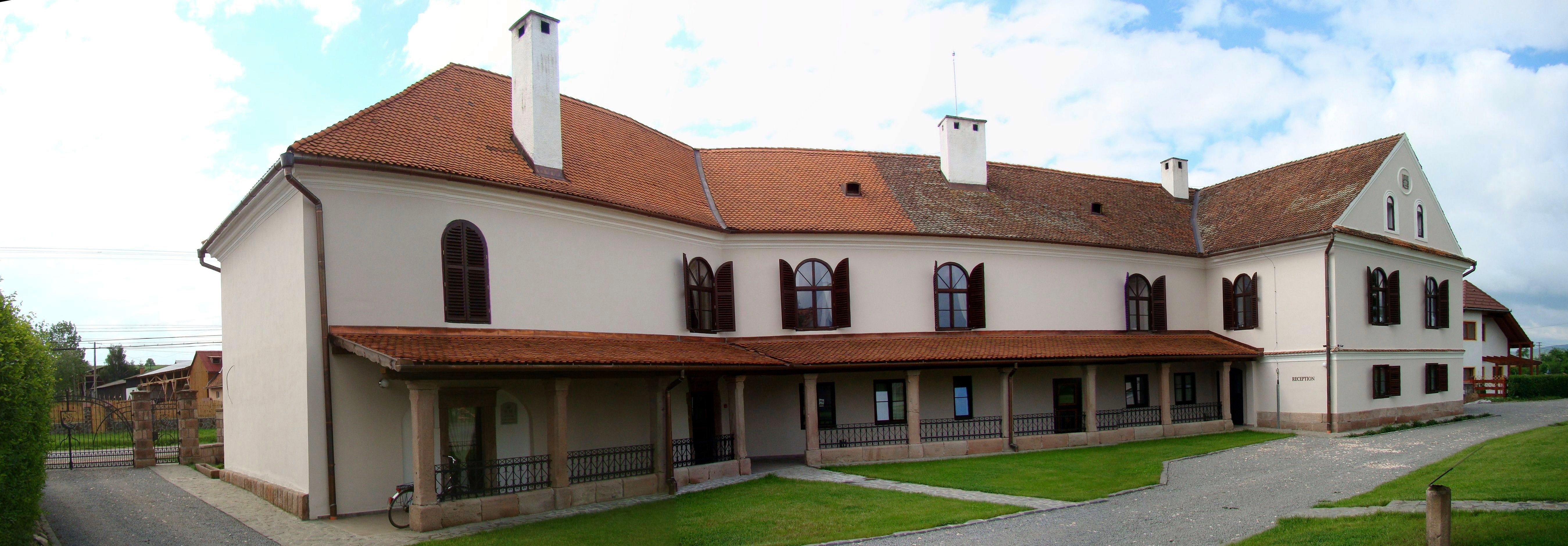 Castelul Daniel